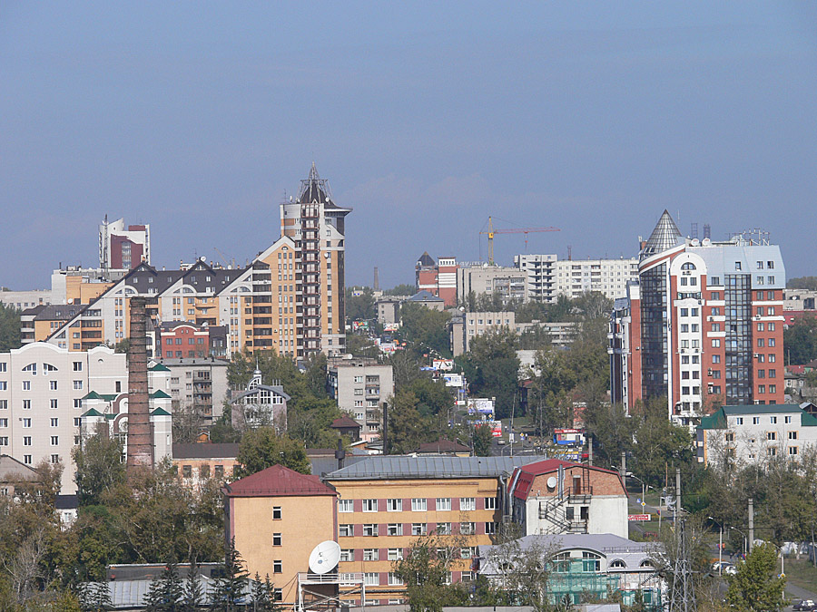 Komsomolsky Avenue highrises